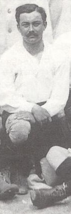 Carlo Rampini nel 1911